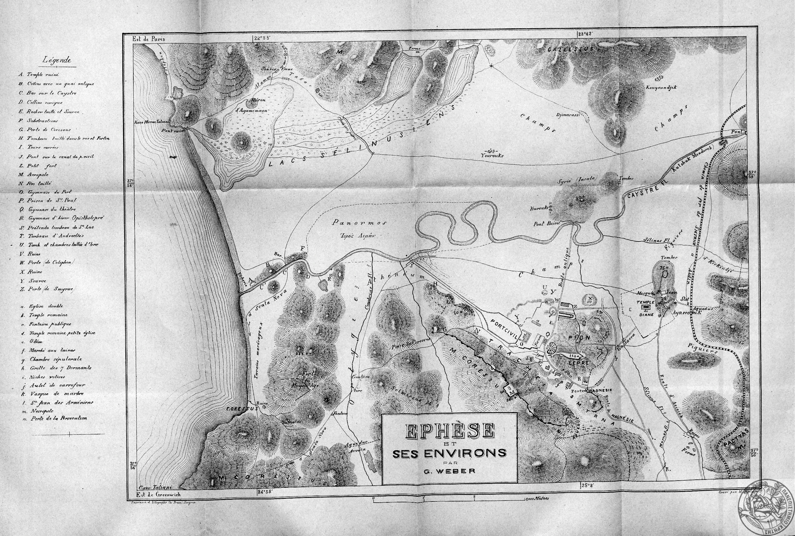 Old map of Ephesus / Ancienne carte d'Ephèse